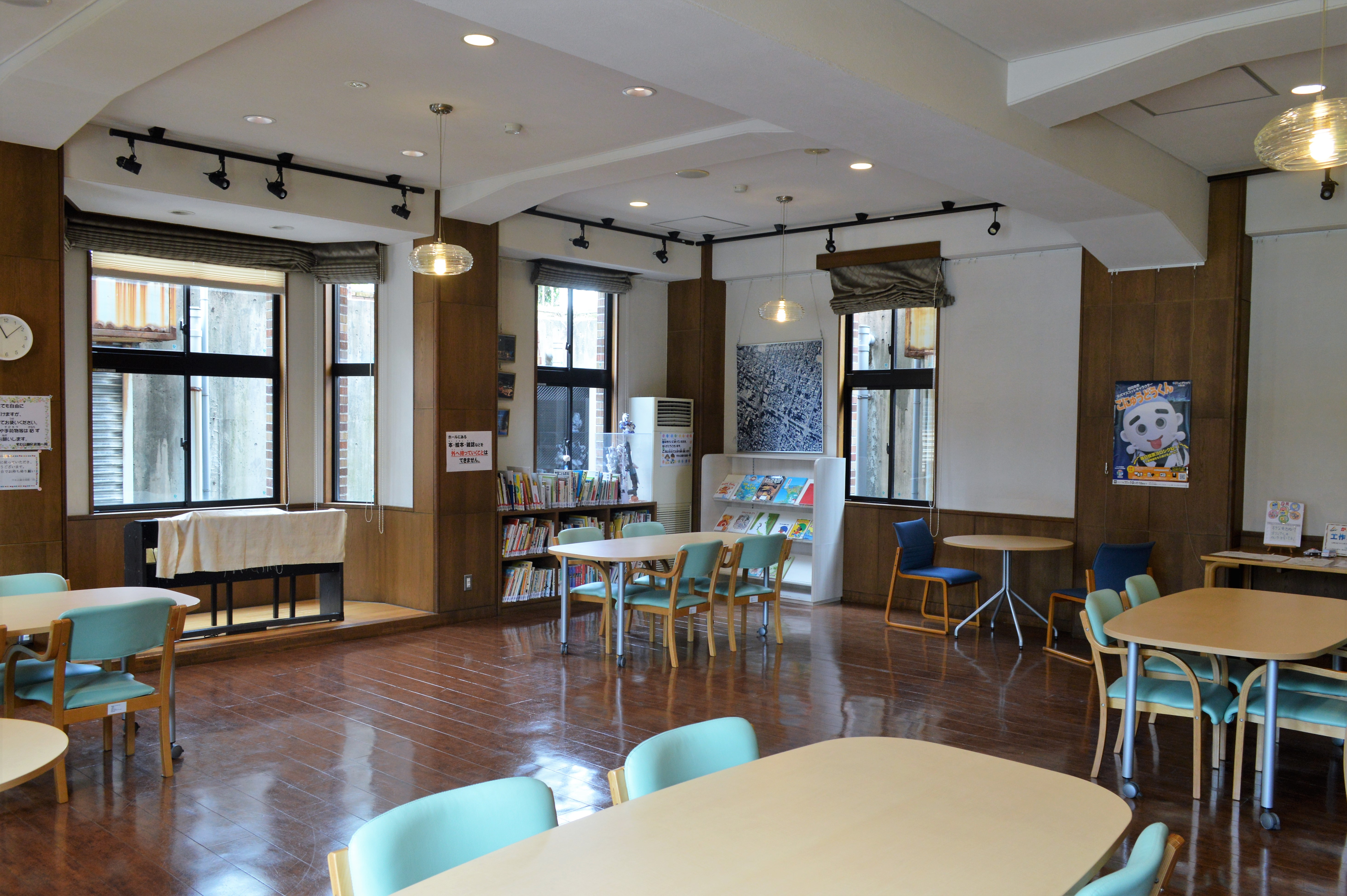 三重県四日市市の諏訪公園にあるすわ公園交流館。旧四日市市立図書館。館内。